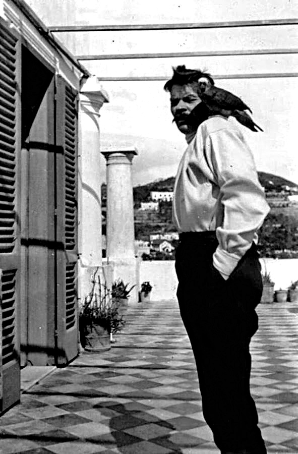 Maxim Gorkij a vállán egy papagájjal